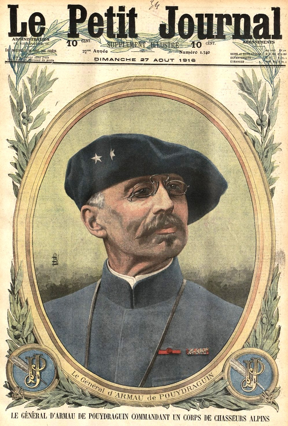 "Une" du supplément illustré du Petit Journal du 27 août 1916.